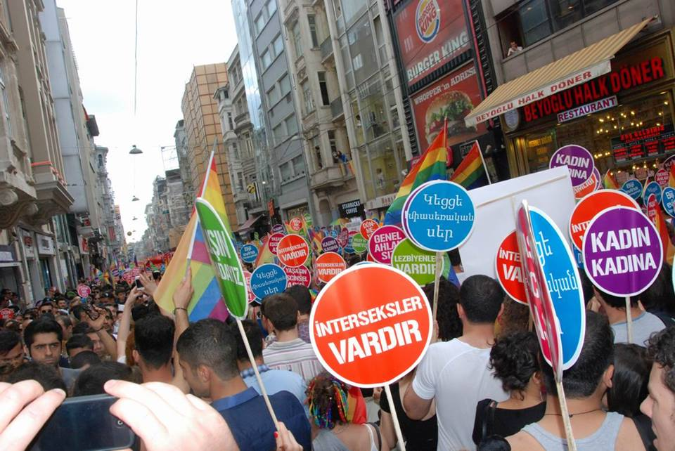 XXII. İstanbul Onur Haftası etkinlikleri kapsamında geleneksel olarak yapılan İstanbul Onur Yürüyüşü'nden görünüm, 2014.